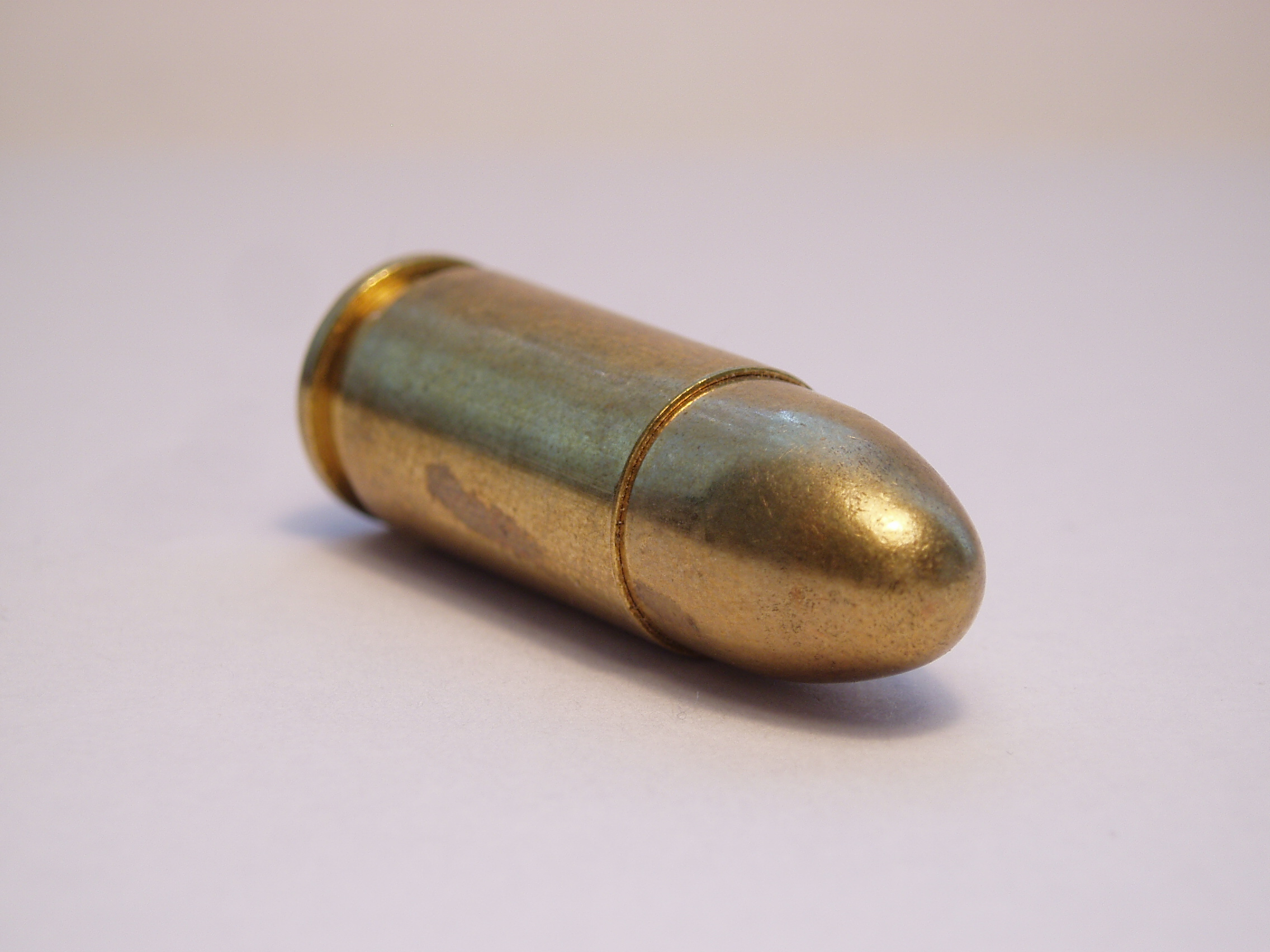 9 mm Luger pistol cartrdige. FMJ bullet. Manufacturer: Sellier & Bellot.